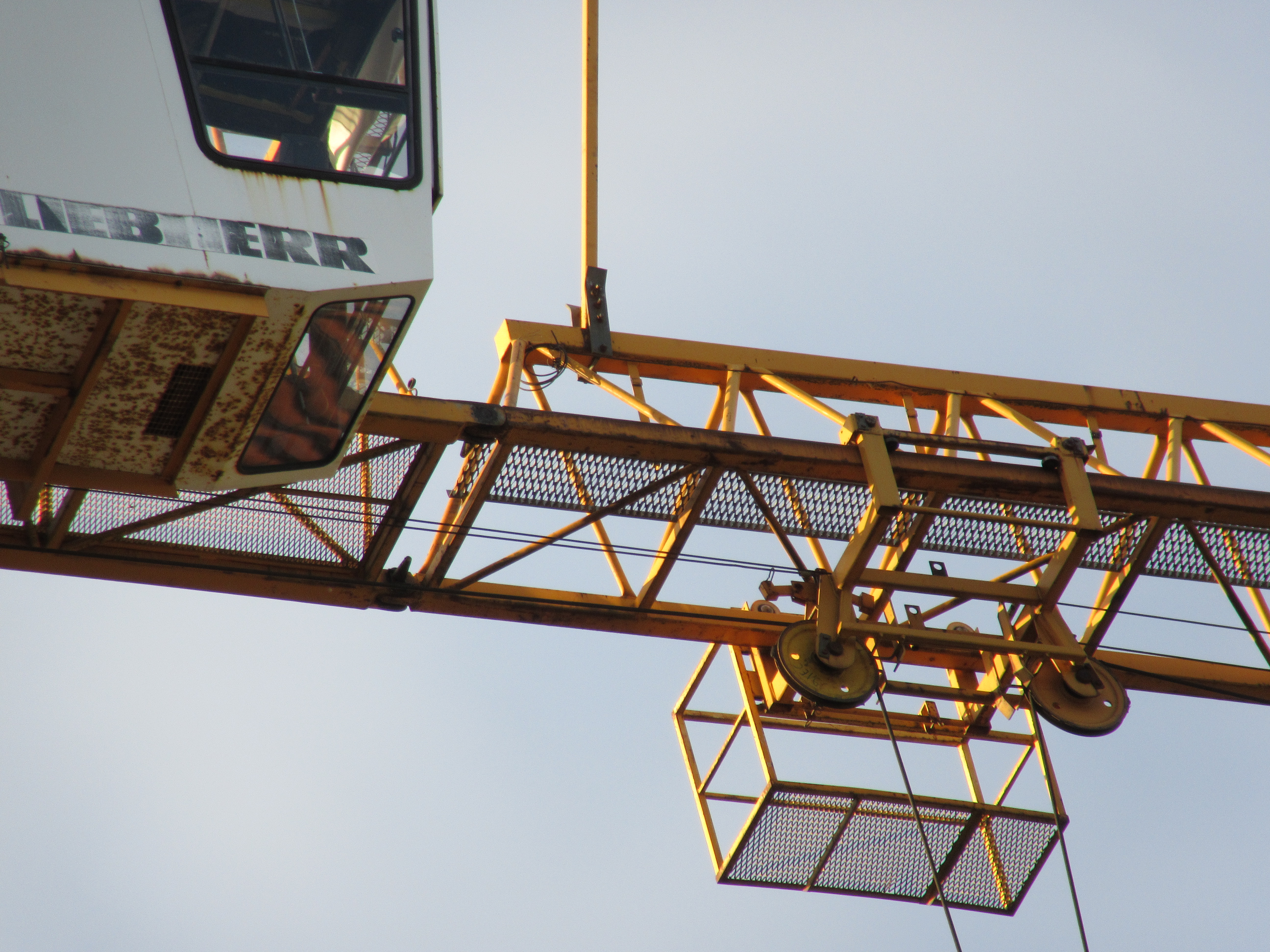 Turmdrehkran auf einer Hochbaustelle.